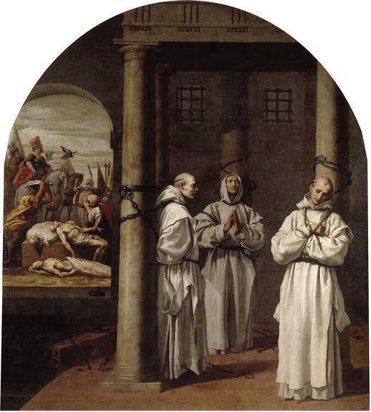 Martirio de los priores de las cartujas inglesas de Londres, Nottingham y Axholme.label QS:Les,"Martirio de los priores de las cartujas inglesas de Londres, Nottingham y Axholme."